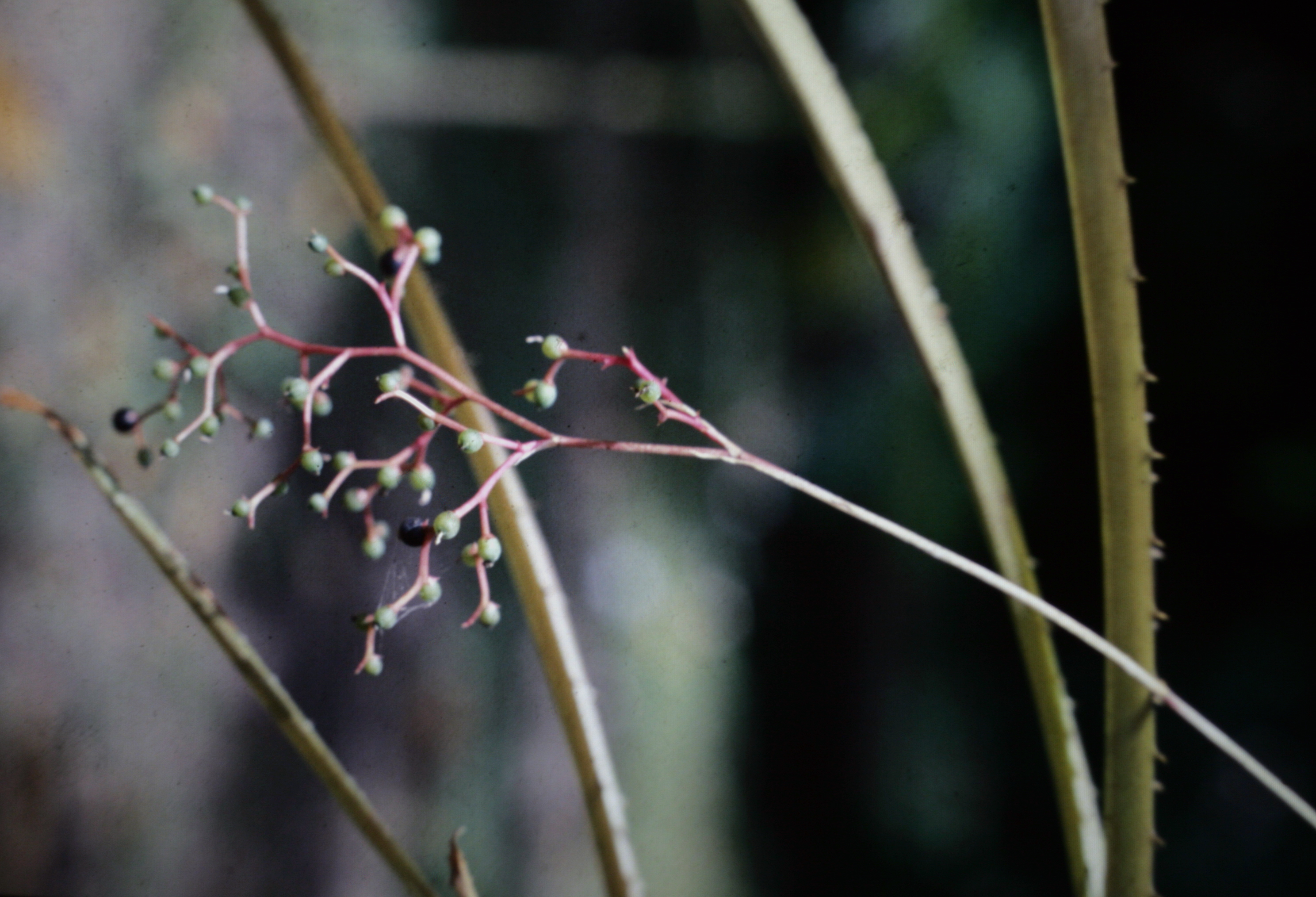 Araeococcus flagellifolius, Suriname